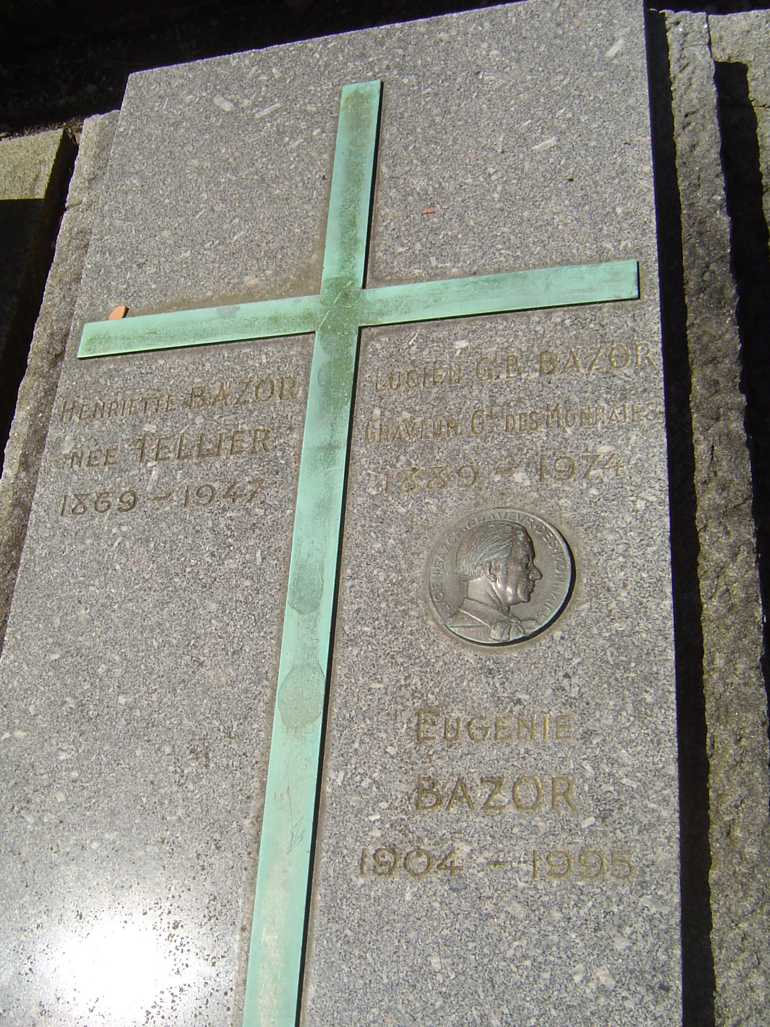 Châtenay-Malaby (ancien cimetière)